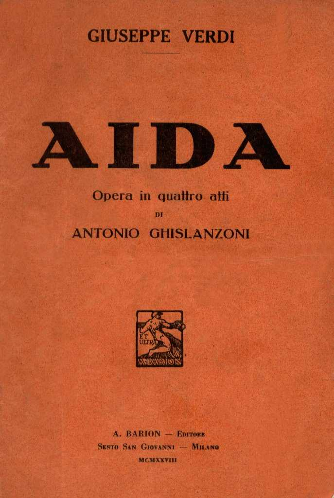 Copertina libretto "Aida" opera in quattro atti di Antonio Ghislanzoni musica di Giuseppe Verdi - editore Attilio Barion Sesto San Giovanni - Milano 1928